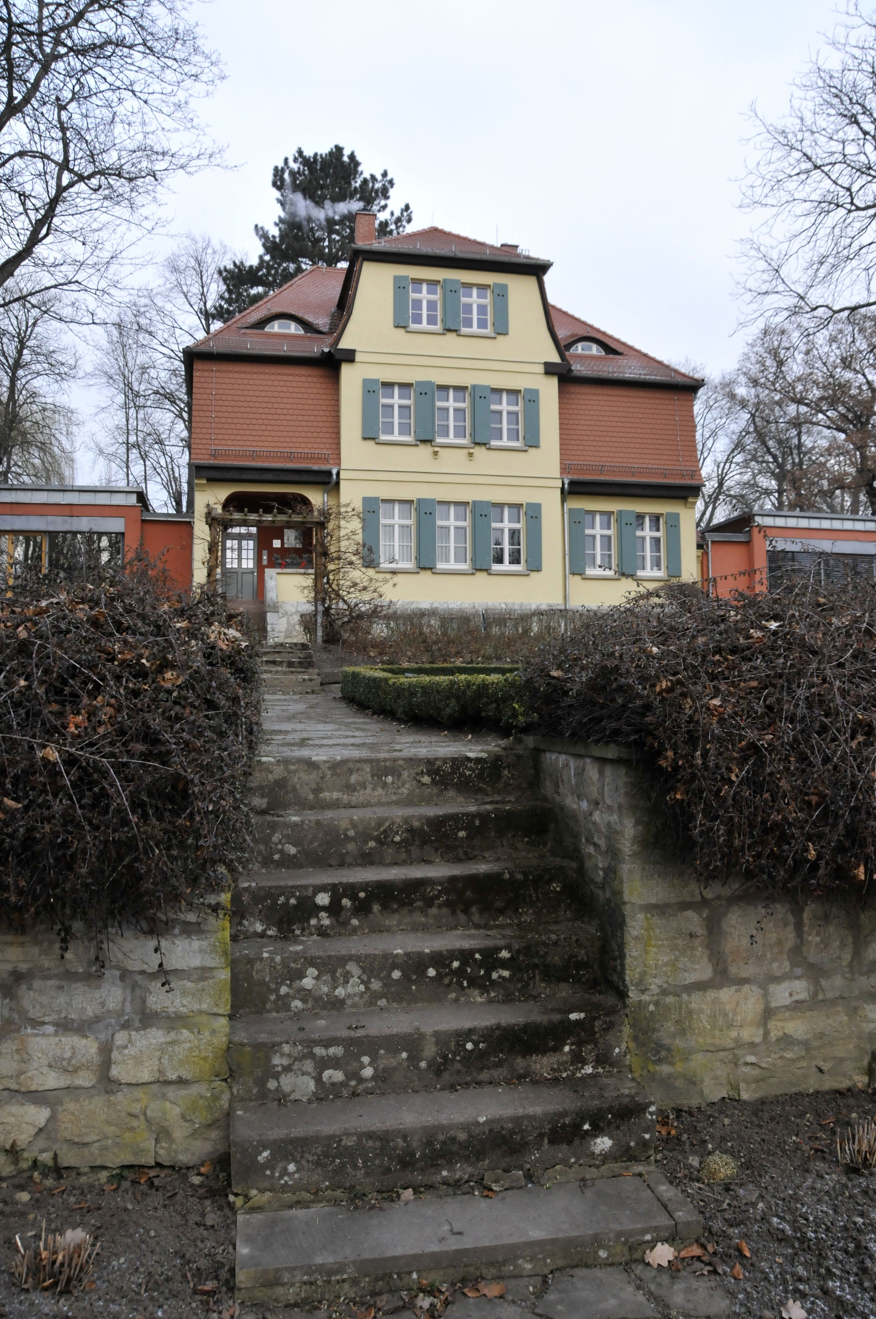 Krüger-Villa, Neudietendorf